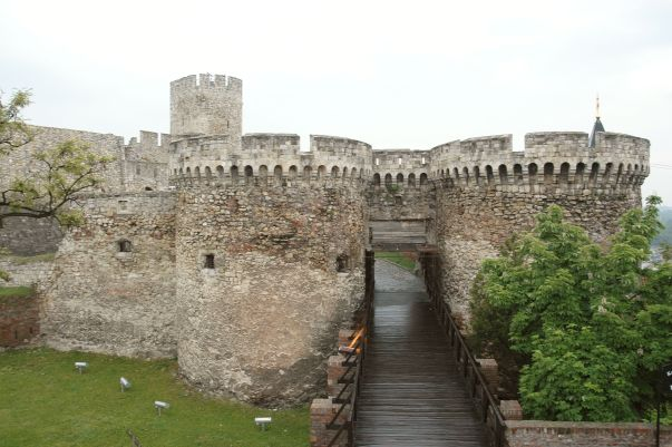 Zindan gate Kalemegdan, Belgrade, Serbia